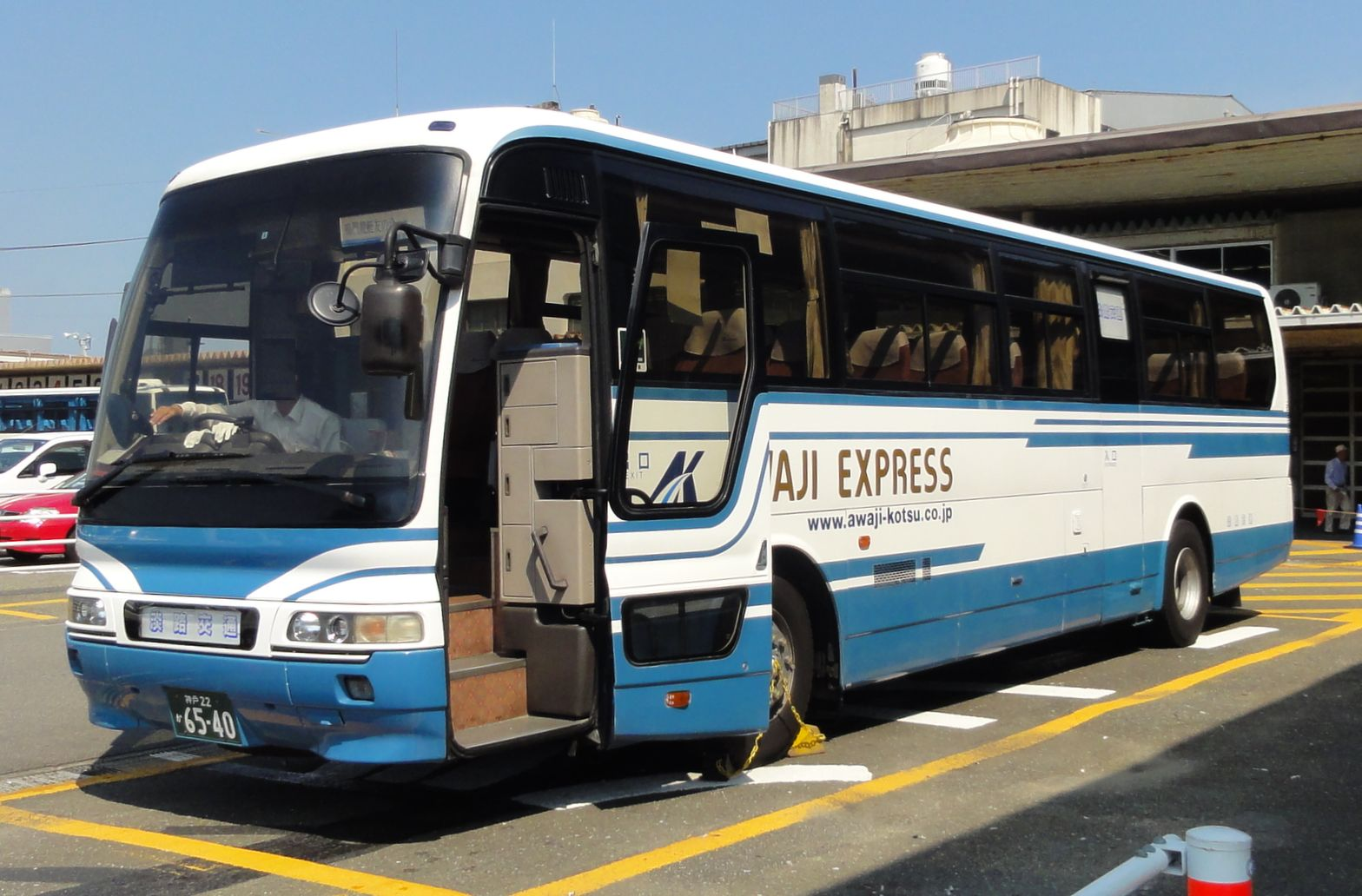 Awaji Kotsu car 淡路交通 中扉付エアロバス